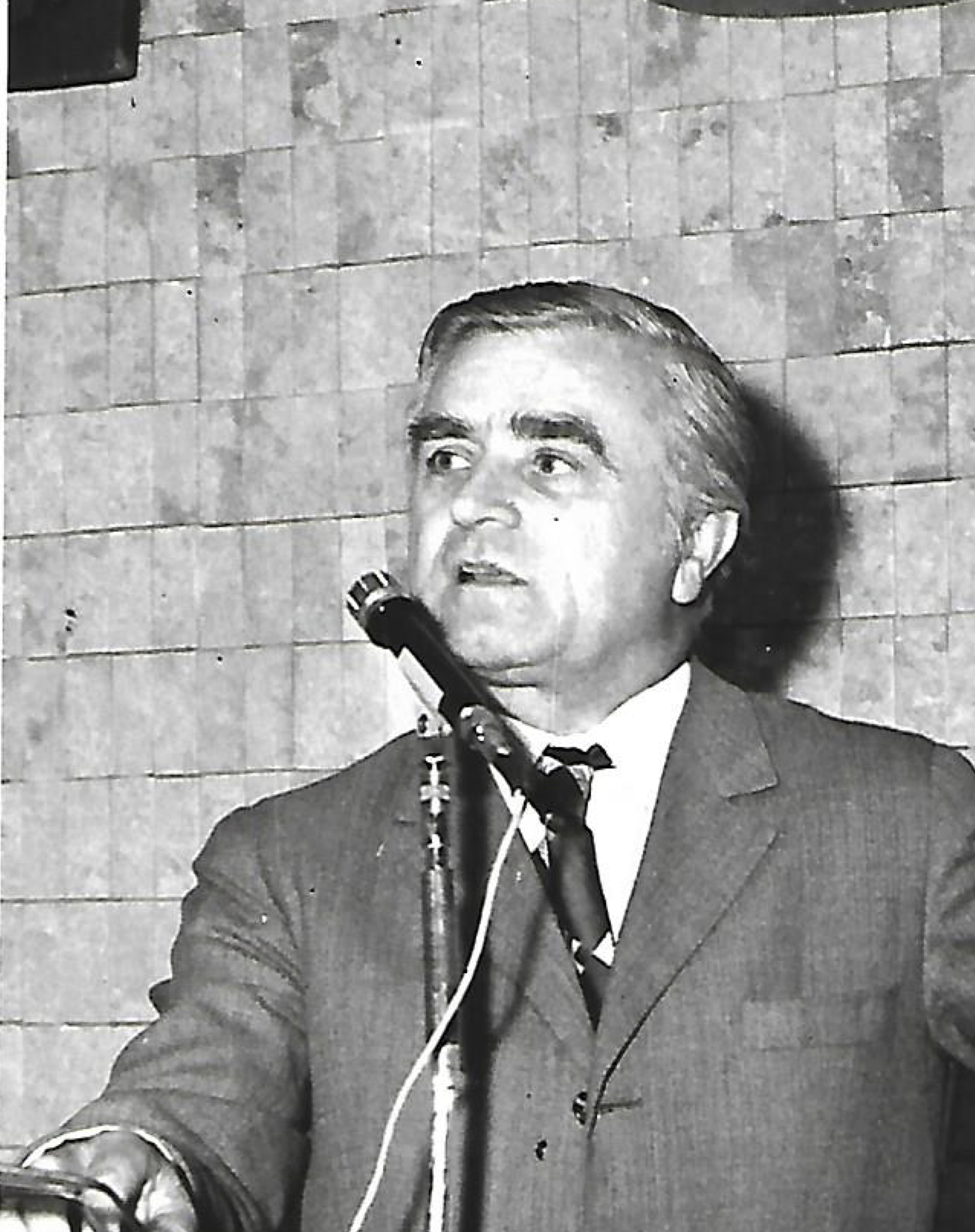 Viktor Fixl, Semily 1976